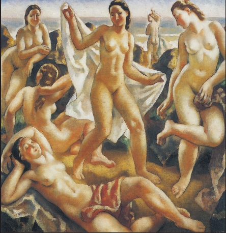 “Bainulariak”, Aurelio Arteta